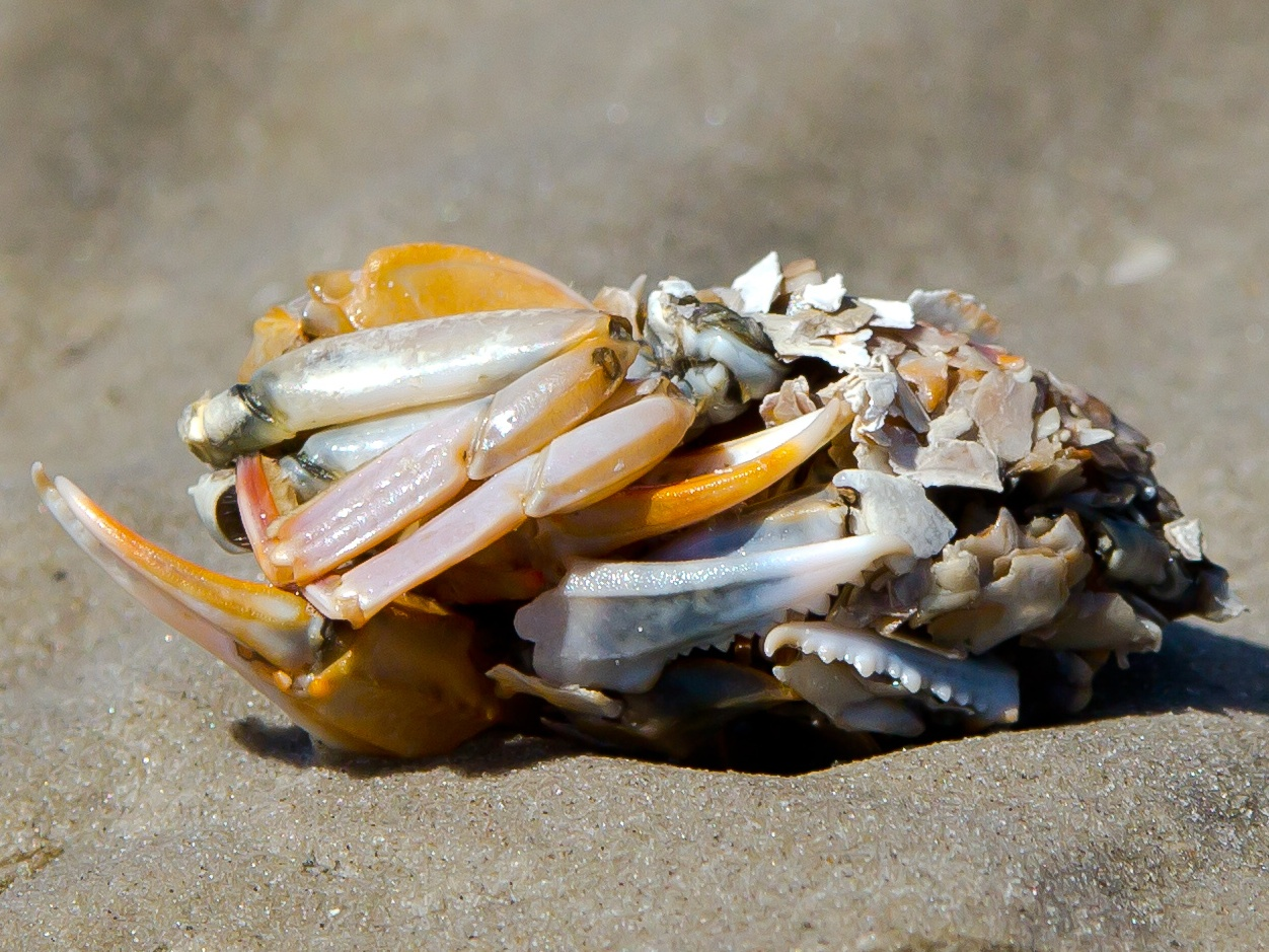 Möwengewölle